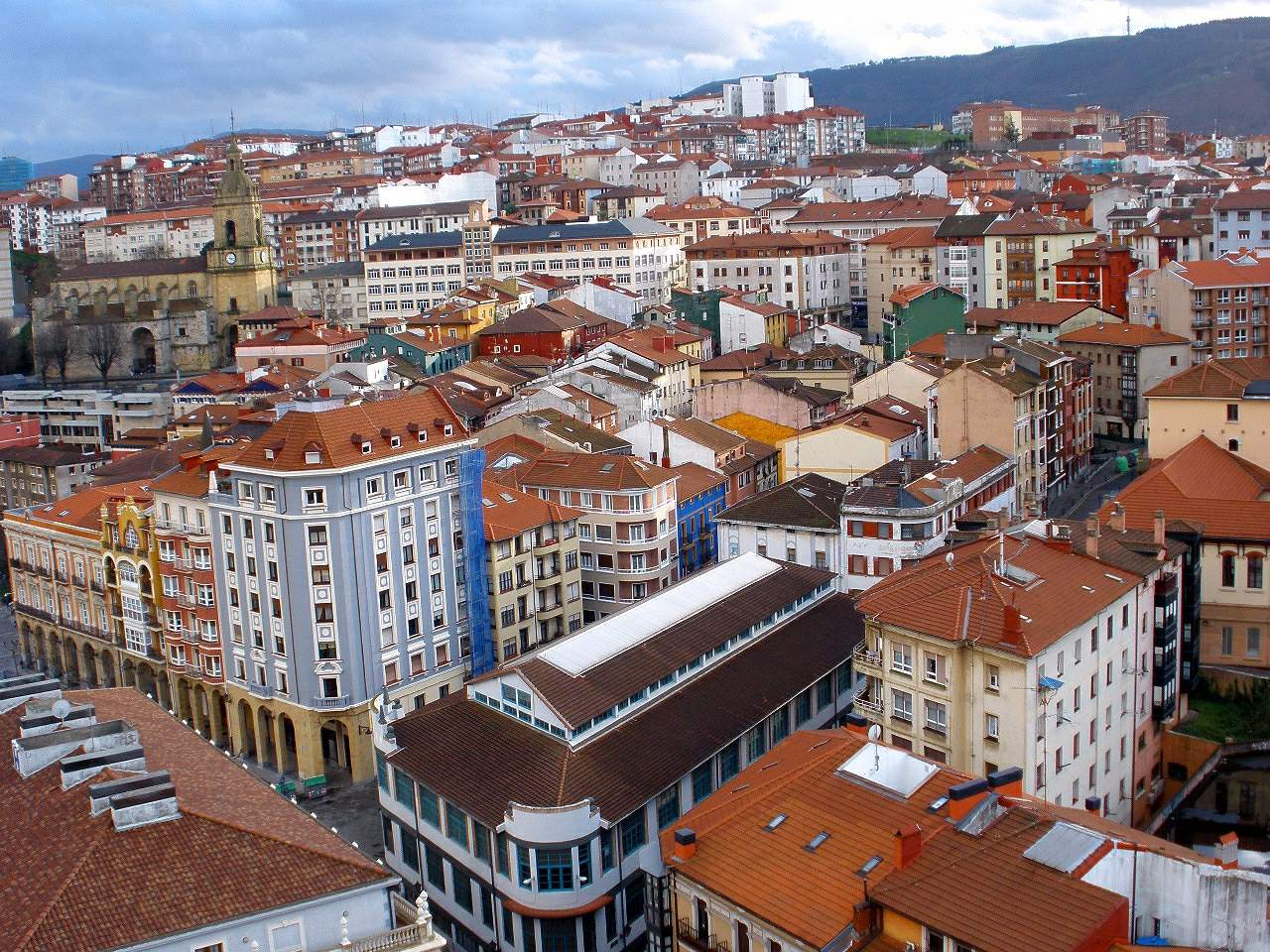 Vista de Portugalete desde el Puente de Vizcaya